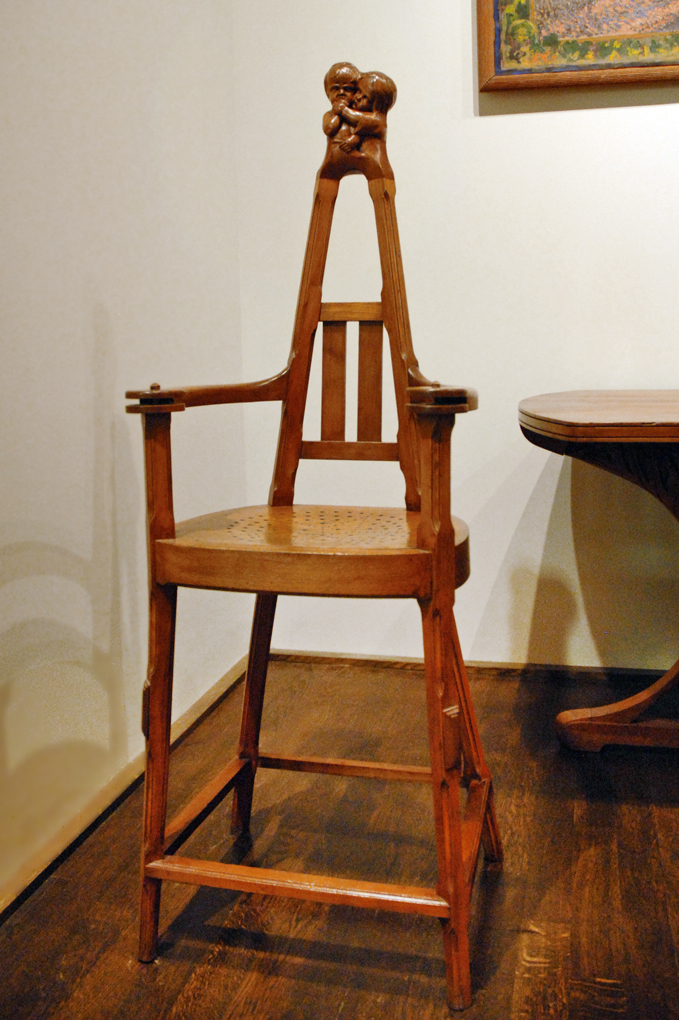 Chaise haute d'enfant De style art nouveau, cette nouvelle acquisition du musée des arts décoratifs est l'oeuvre de Jean Dampt (1854-1945), sculpteur à Paris. Elle a été réalisée en hêtre et merisier sculpté. Elle date de 1897. L'achat par le musée a bénéficié du soutien de la Galerie Franck Laigneau. voir la notice site du musée